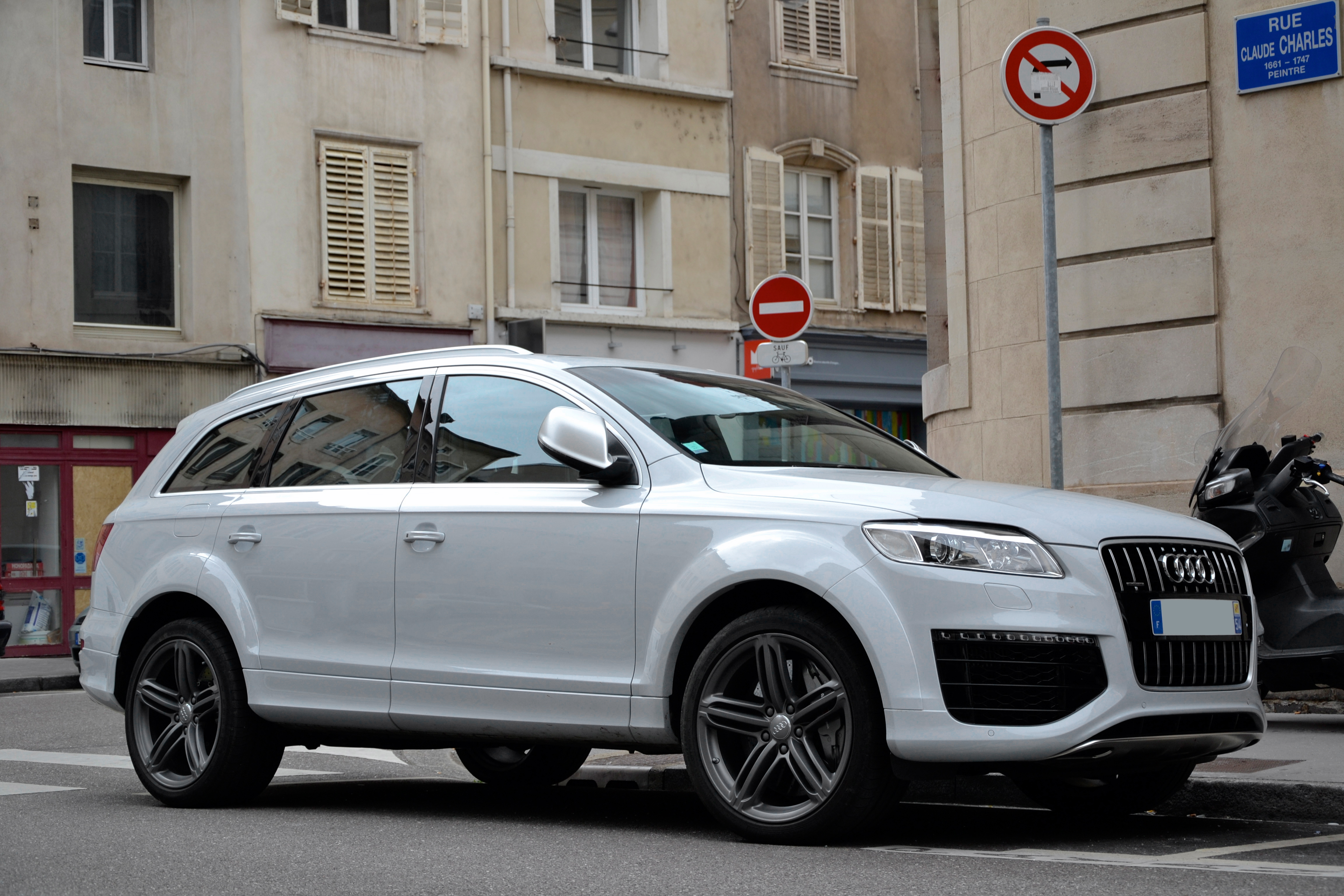 Audi Q7 V12